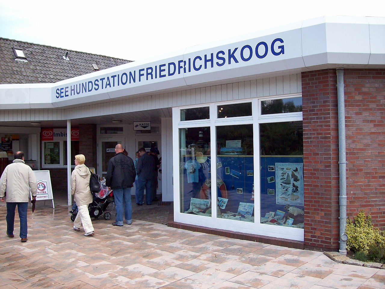 Friedrichskoog (Germany), Seehundstation, Eingang